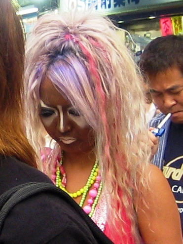 Quintessential Yamamba Gal, or Yamamba Girl. 2006, Japan